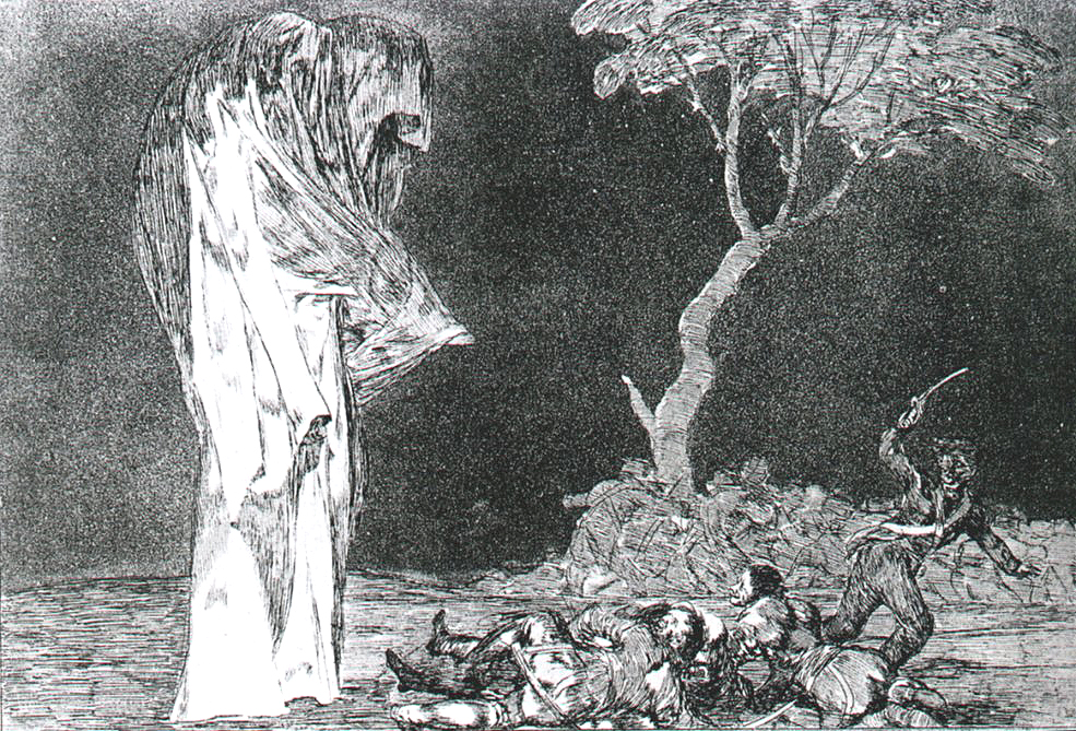 Disparate nº 2. Disparate de miedo.